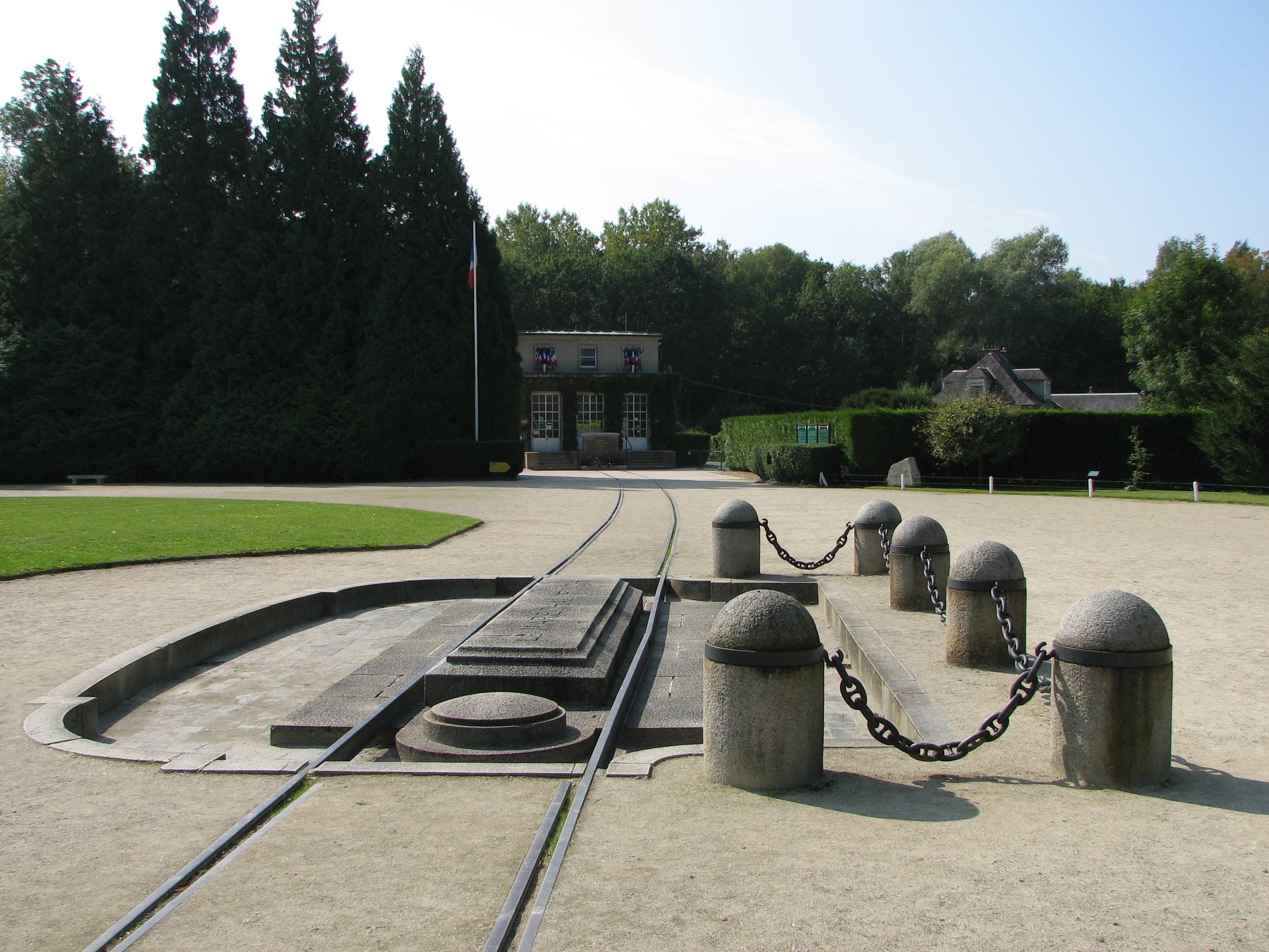 Clairière de l'Armistice, appelée aussi clairière de Rethondes. Au premier plan, l'emplacement où se trouvait le wagon de l'Armistice, au second plan, le musée de l'Armistice qui abrite un wagon identique.